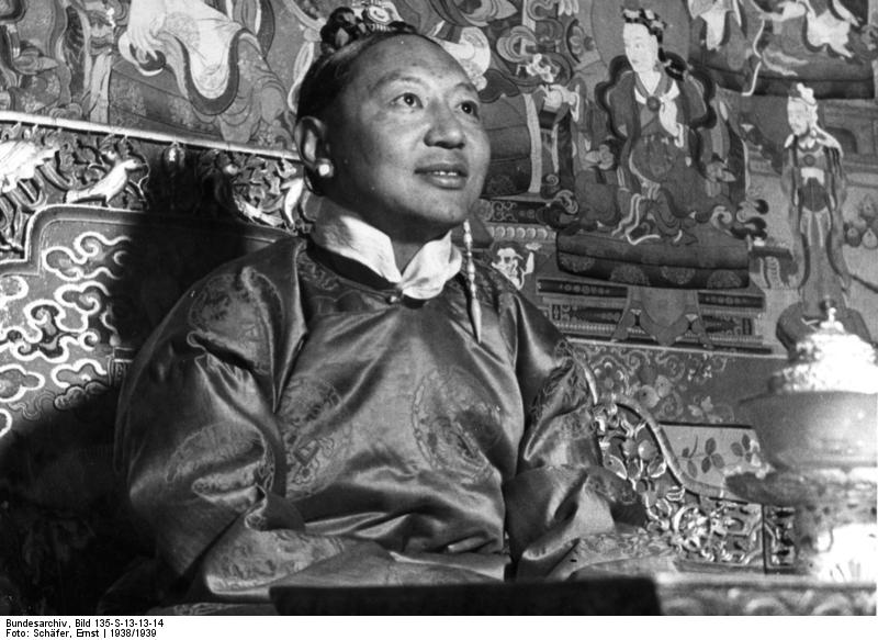 Lhasa, der Premierminister